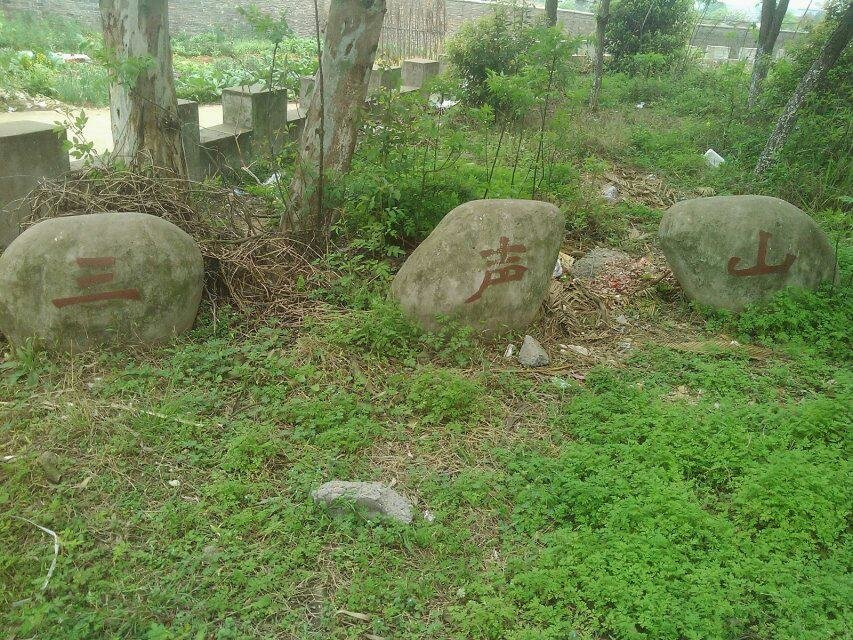 泰和县第二中学_三声山